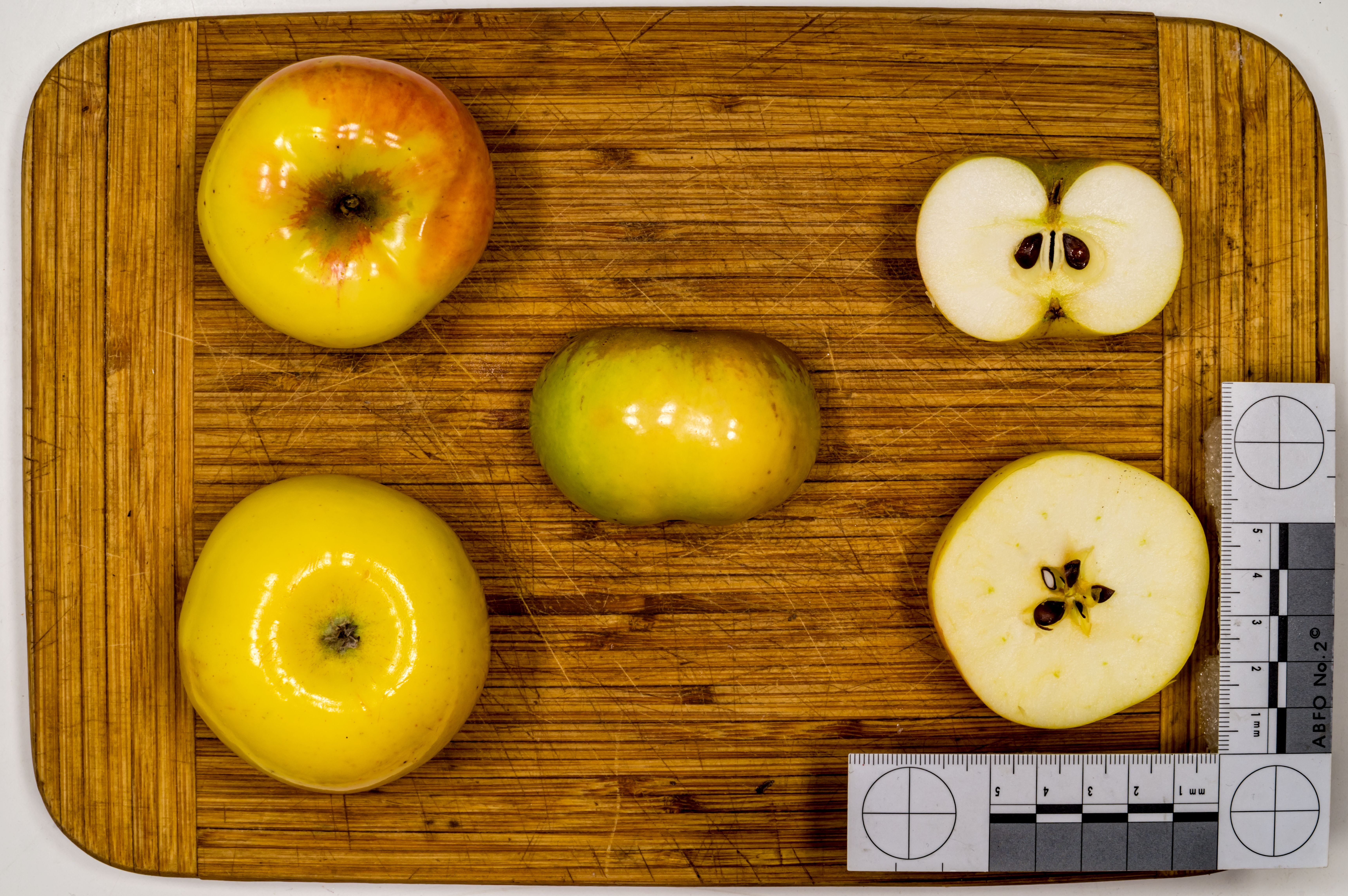 Apfelsorte: Loskrieger (ältester bekannter Name), Glasrenette, Reinette de Versailles, Reinette de Champagne